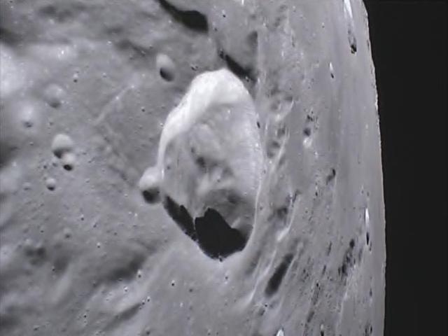 Foto del Crater Uker tomada por la sonda Ebb de la NASA